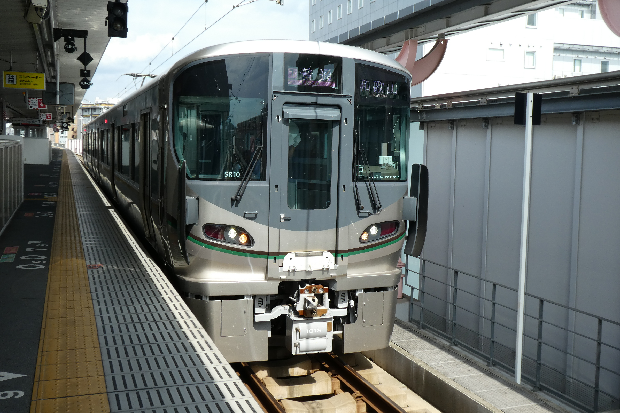 JR西日本227系電車。JR奈良駅。